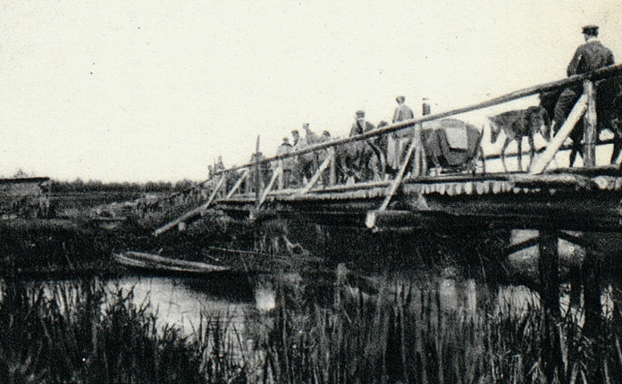 Odwrót oddziałów legionowych spod Kostiuchnówki. Przemarsz przez most na Stochodzie.